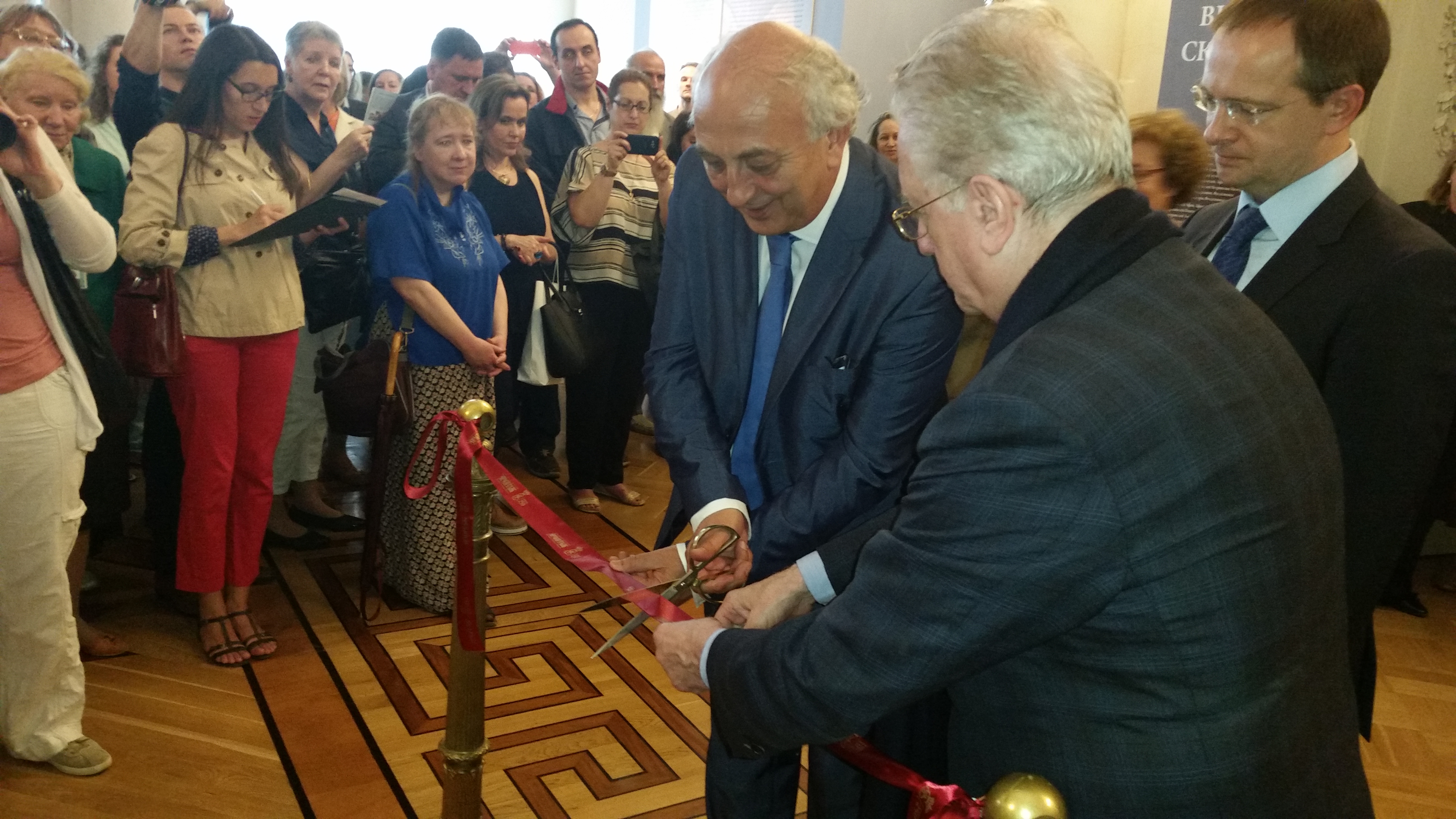 Χαιρετισμός ΥΦΥΠΕΞ, Γ. Αμανατίδη ως εκπροσώπου της Κυβέρνησης στα εγκαίνια της Έκθεσης Βυζαντινής Τέχνης «Το Βυζάντιο στο Πέρασμα των Αιώνων», στο Μουσείο Hermitage